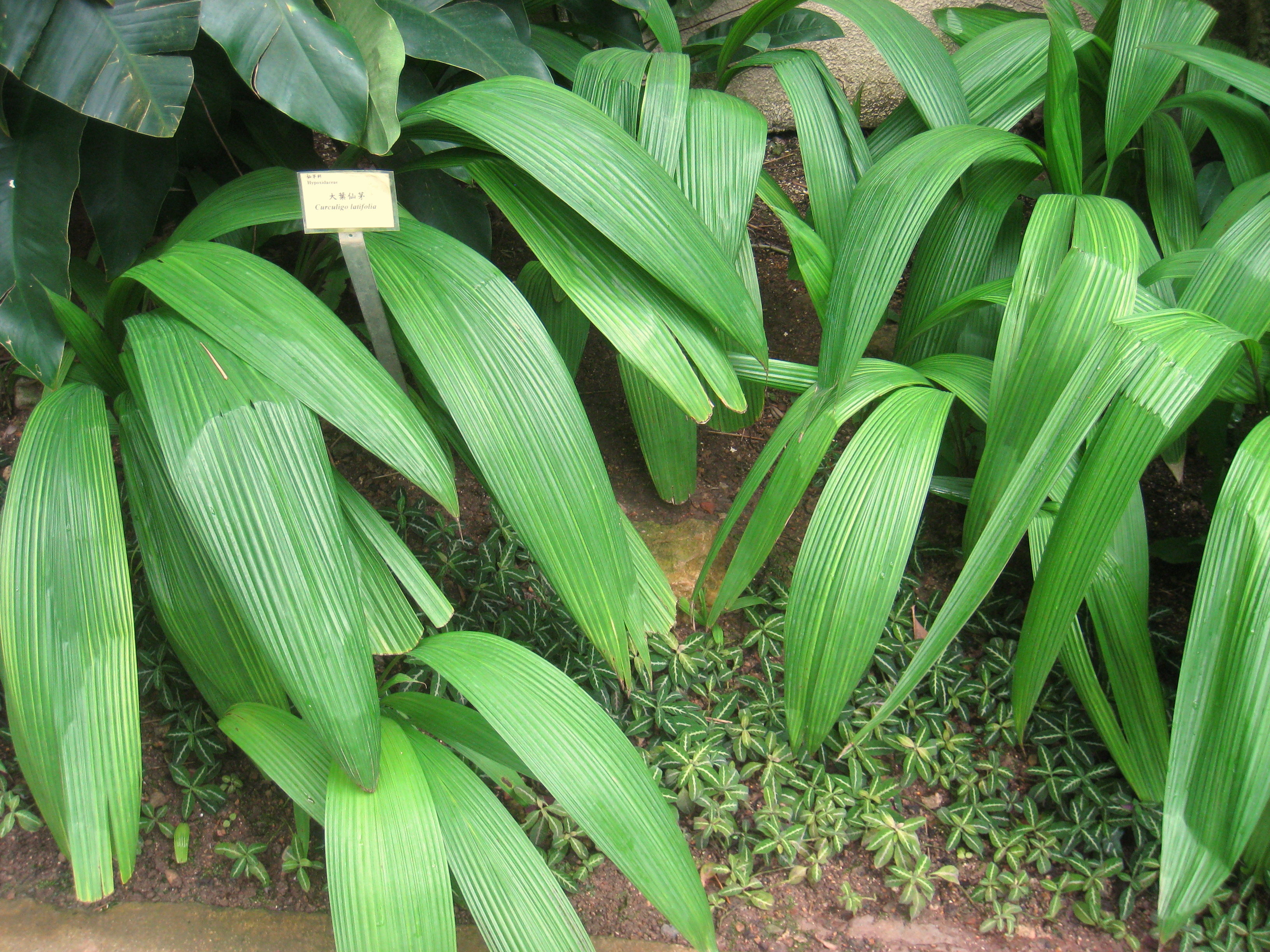 Curculigo latifolia. Hong Kong Park Conservatory in Hong Kong Park, Hong Kong.